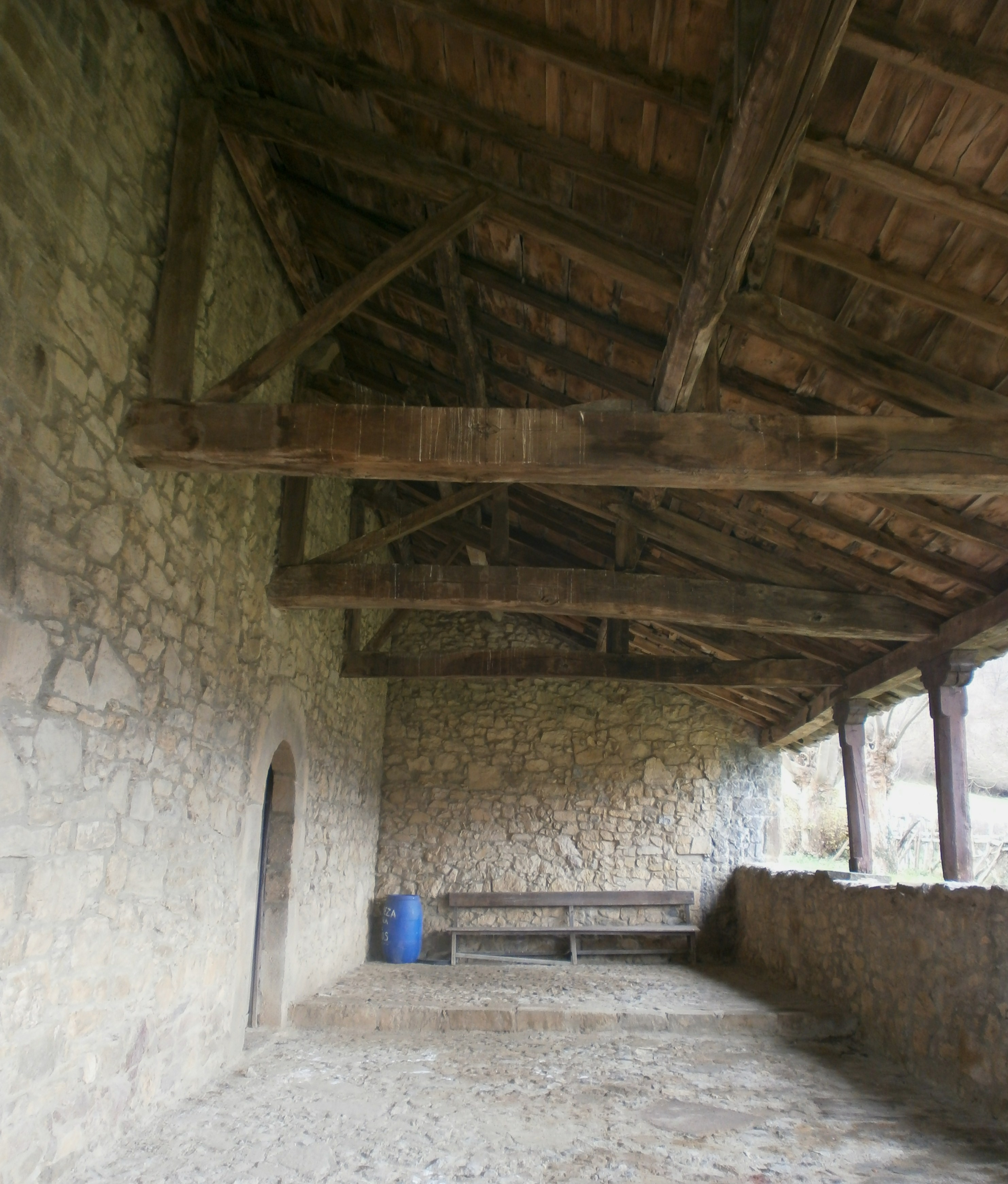 Átrio enlosado hacia occidente.